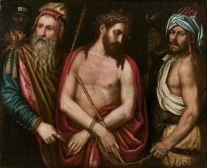 Niccolo Frangipane, Ecce Homo